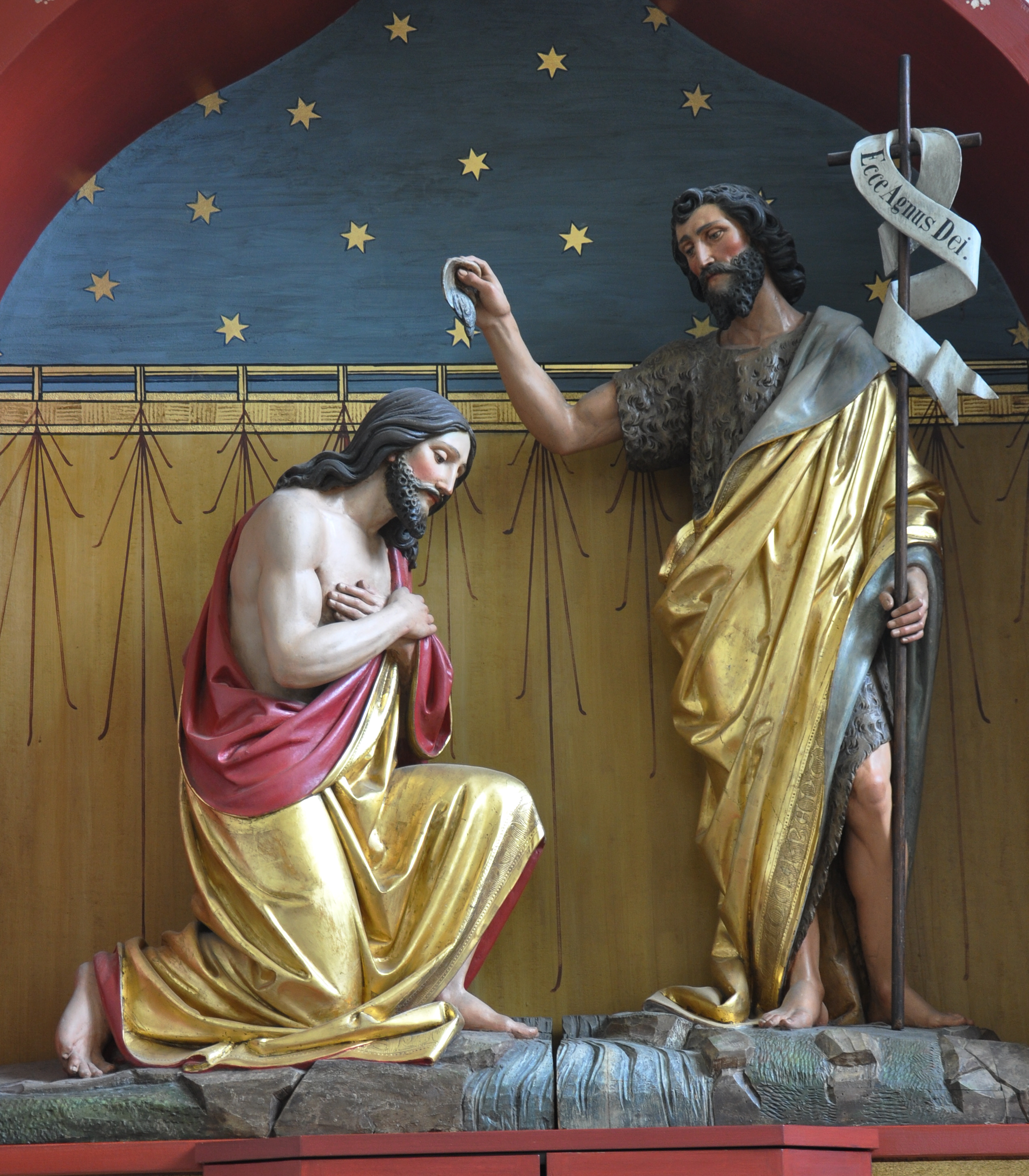 Friedrichshafen, Ortsteil Ailingen, Katholische Pfarrkirche St. Johannes Baptist, Altar an der Chorrückwand, 1985 aufgestellte Zusammenstellung von Teilen der ehemaligen neugotischen Ausstattung der Kirche Mittelfeld „Taufe Jesu“ vom 1958 abgebrochenen Hochaltar von Anselm Sickinger, 1862, neue Rahmung und neuer Hintergrund